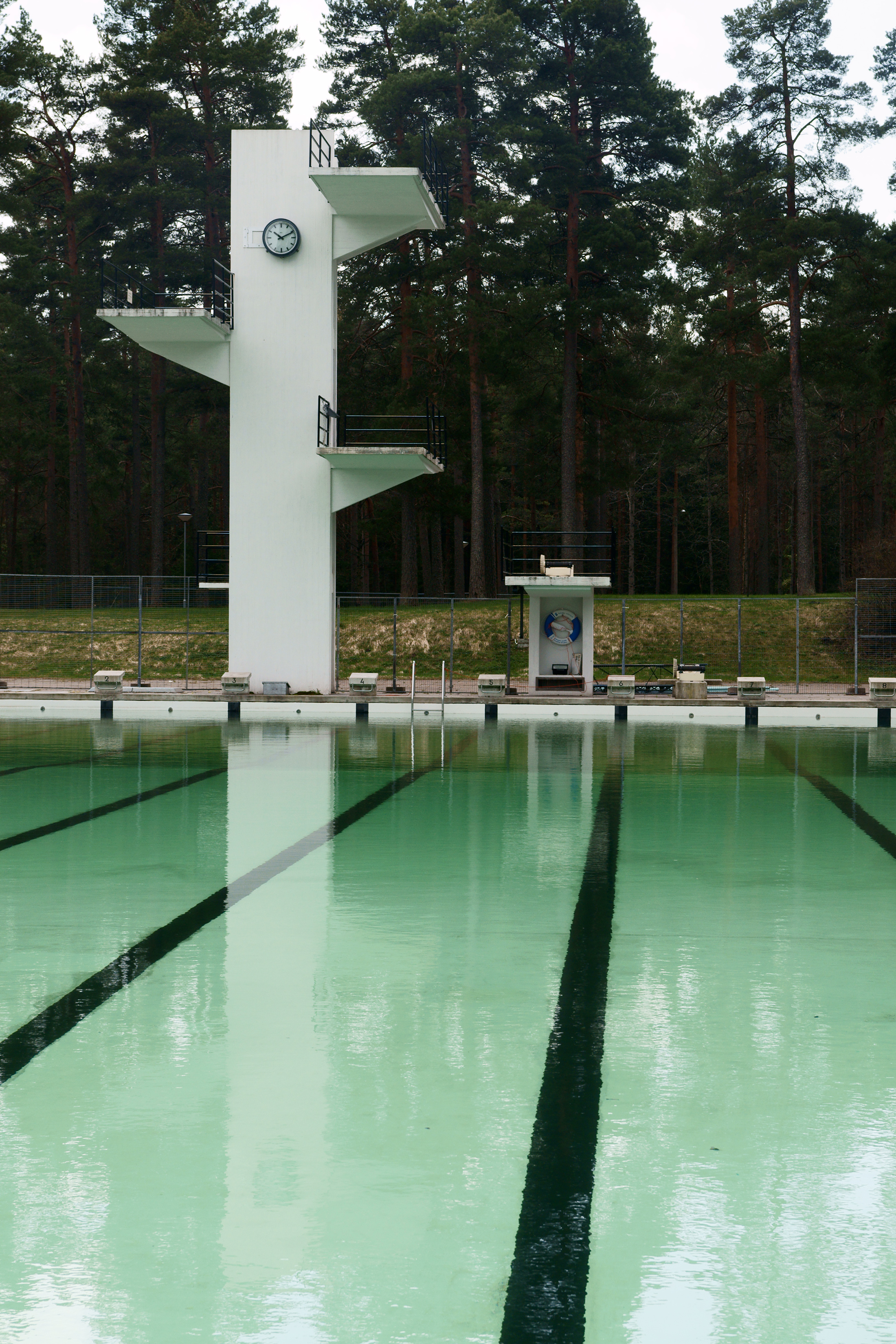 Porin maauimalan hyppytorni ja 50 metriä pitkä uima-allas keväällä (kummallisessa vihreässä vedessä).